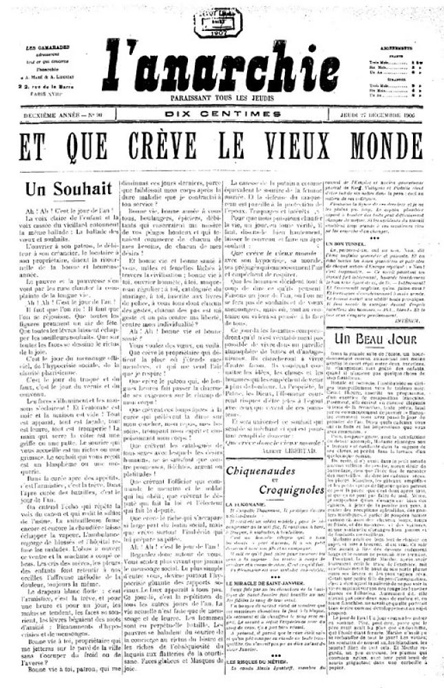 l'anarchie est un journal individualiste anarchiste fondé le 13 avril 1905 par Albert Libertad et Anna Mahé - numéro du 27 décembre 1905